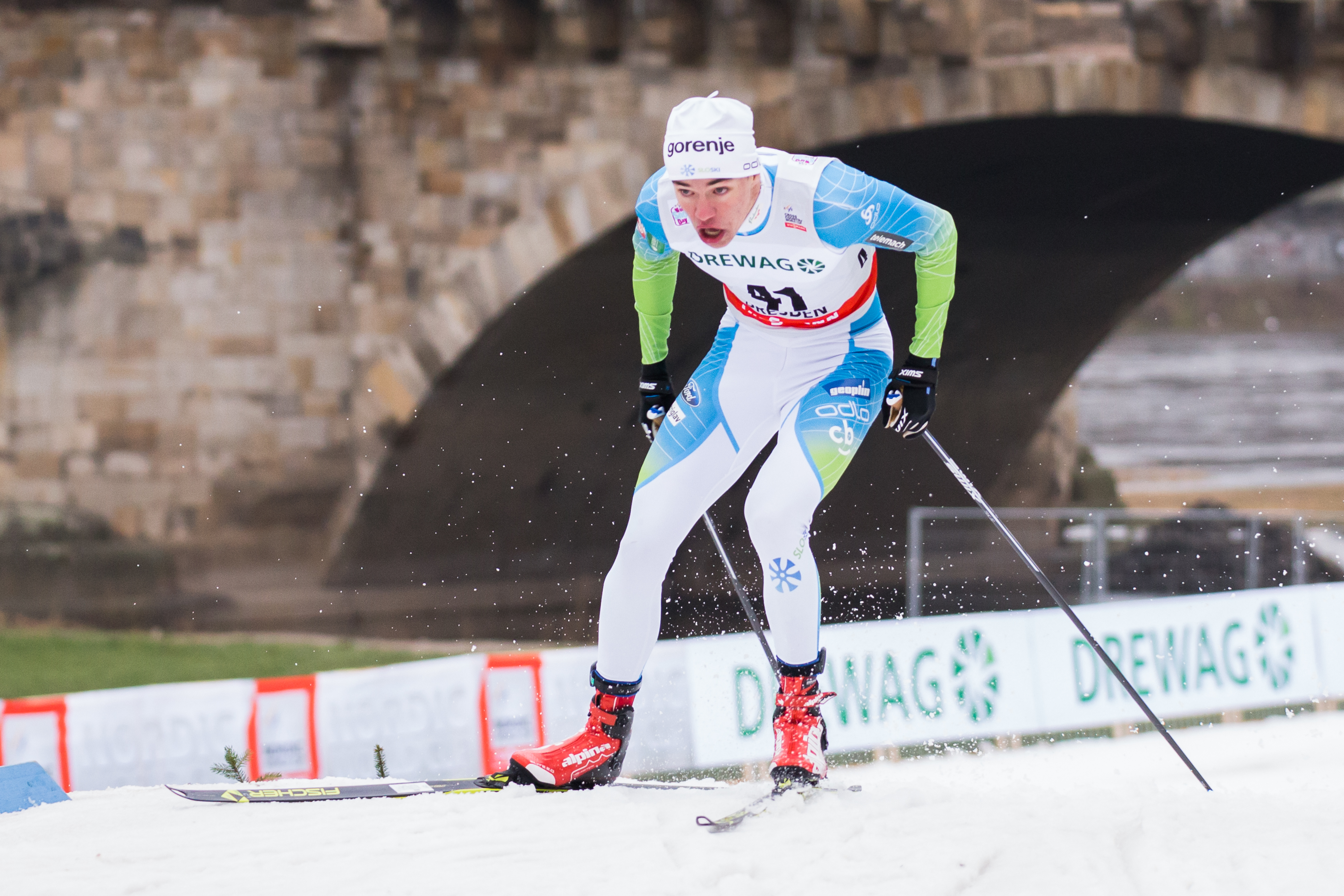 Janez Lampic (SLO, Slowenien)